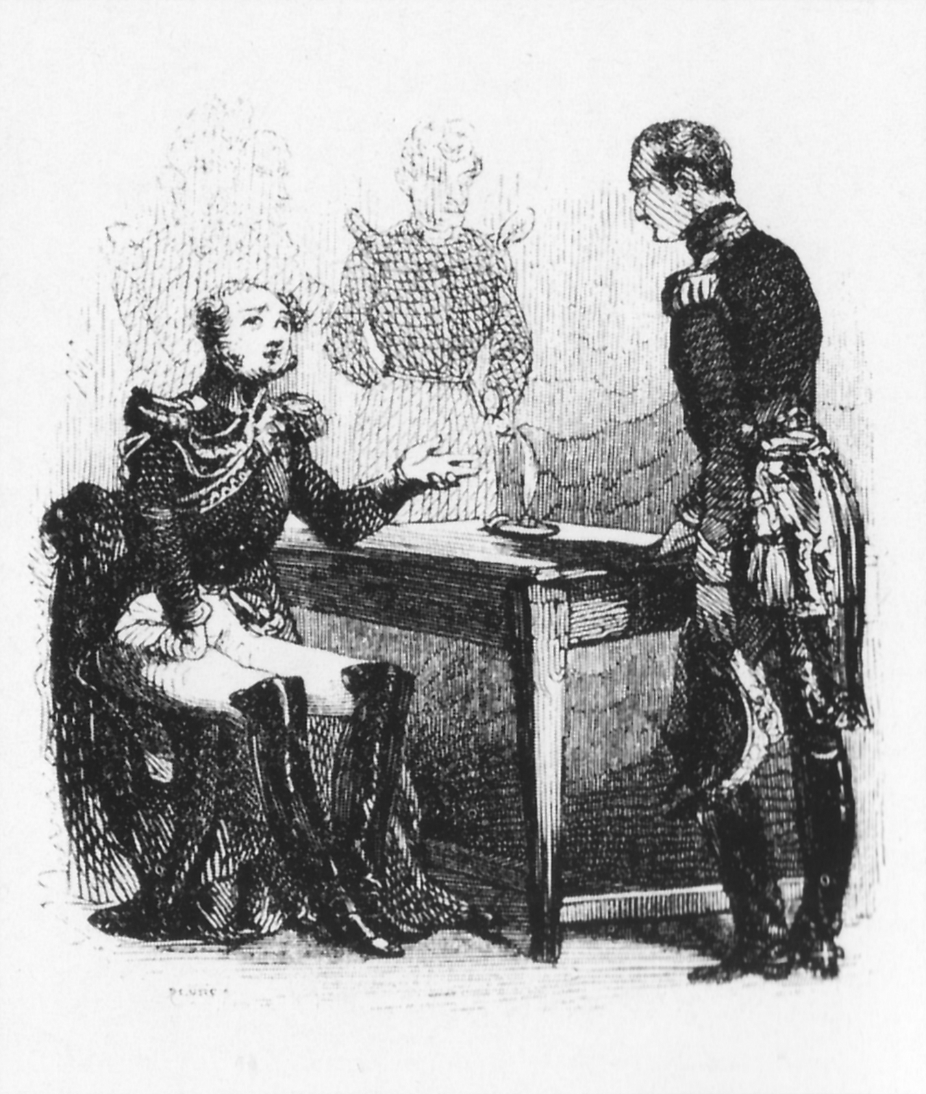 Francouzský vyjednavač generál Savary u cara Alexandra I. v době kolem bitvy u Slavkova (1805). Reprodukce starší kresby či litografie bez uvedení autora.